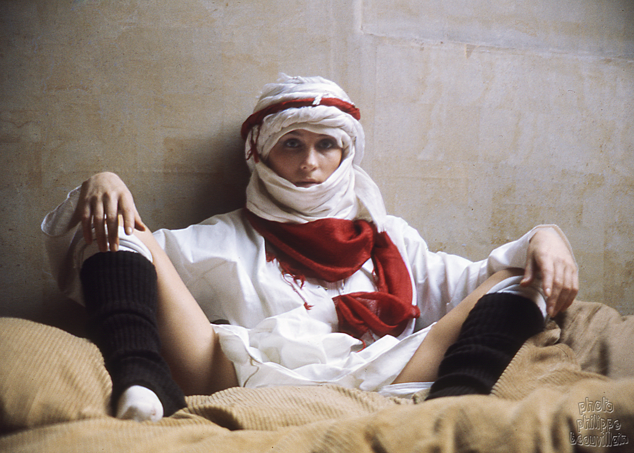 Portrait d Sirpa Lane pris chez elle à Paris